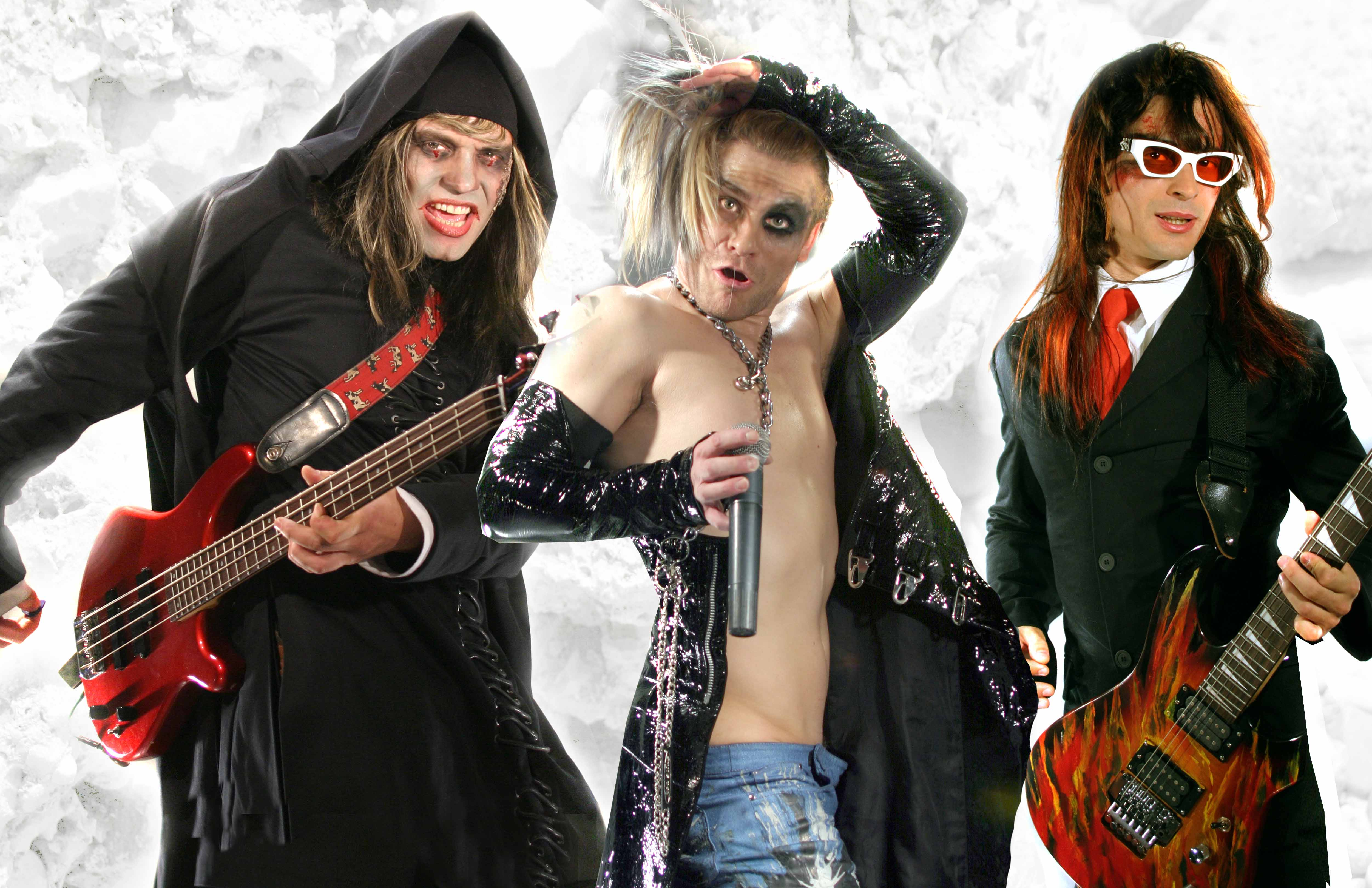 Сценические образы солистов "На-На" для проекта "Big_Bang" 2003 год